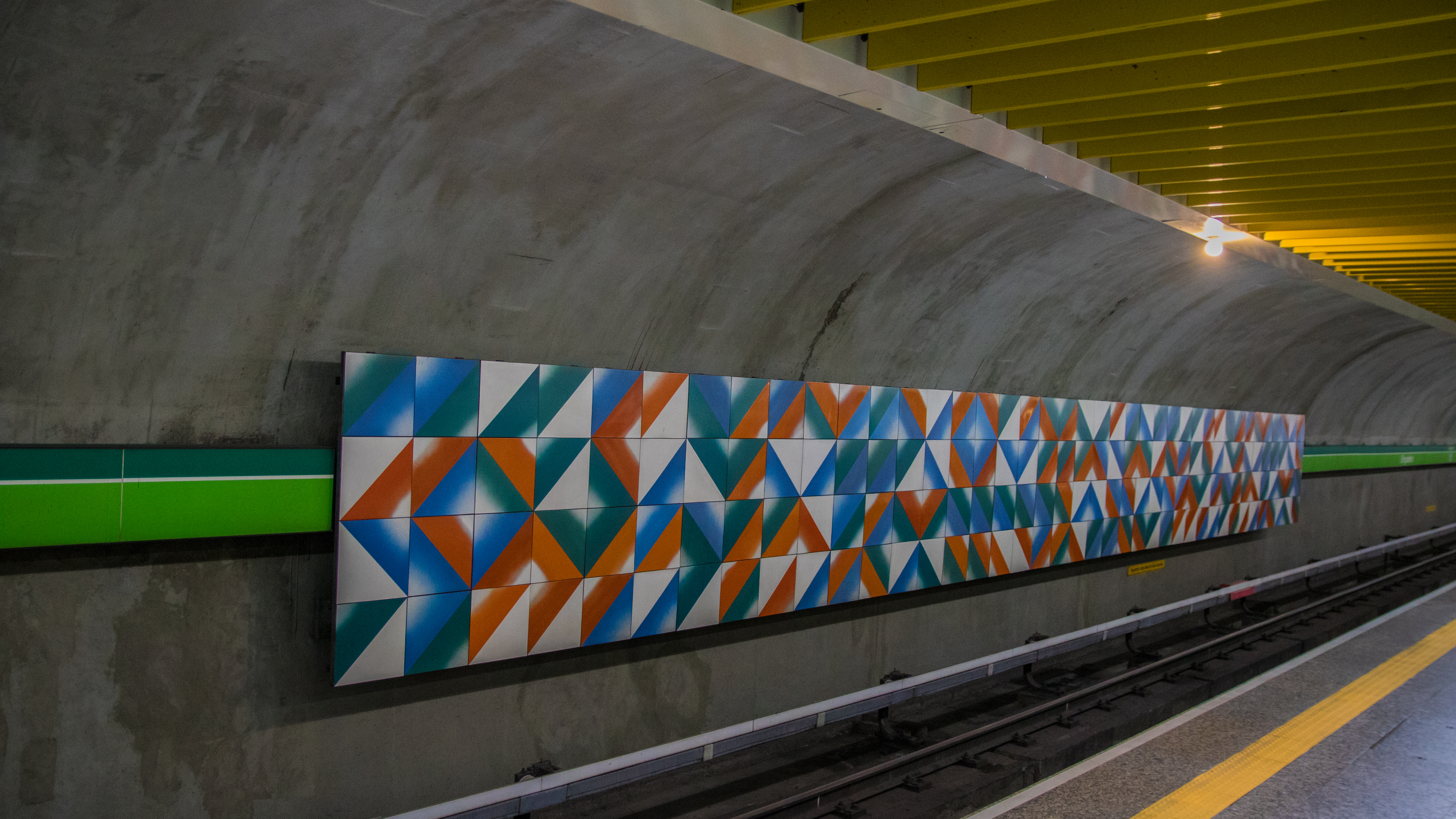 Painel "Des-Aceleração", de Fernando Lemos (1991), criado a partir de formas triangulares azuis, verdes, vermelhas e brancas